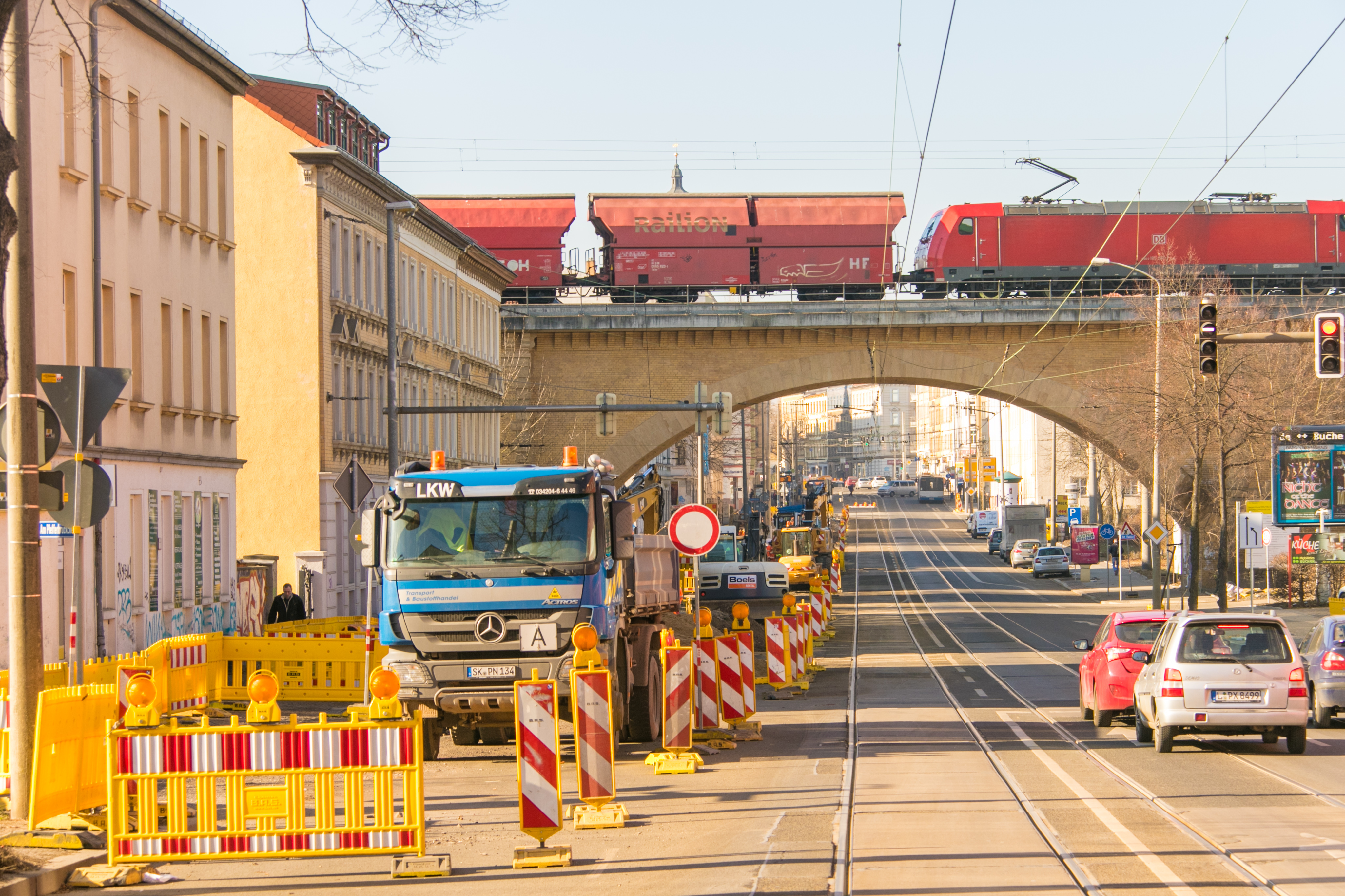 Georg-Schumann-Straße, Umbau Gleisanlagen vor der Endstelle Wahren.